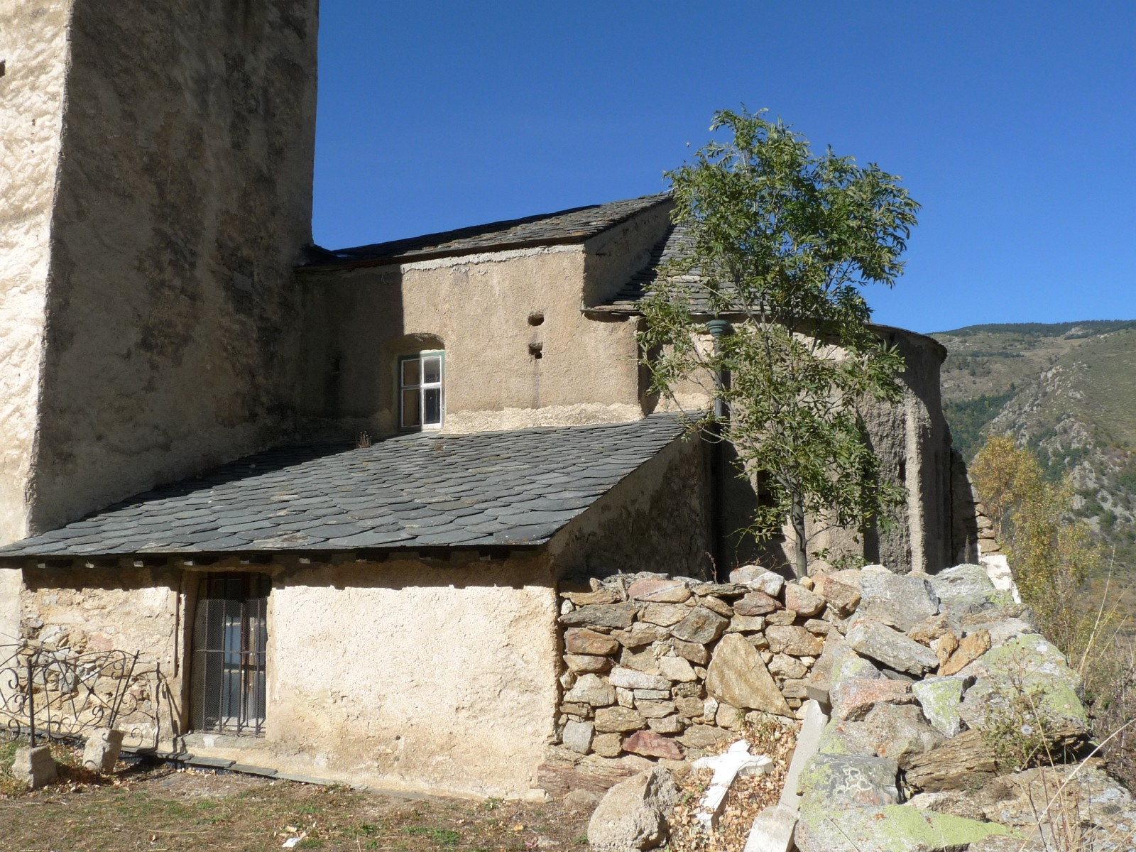 Eglise de Prats-Balaguer, Pyrénées-Orientales, France